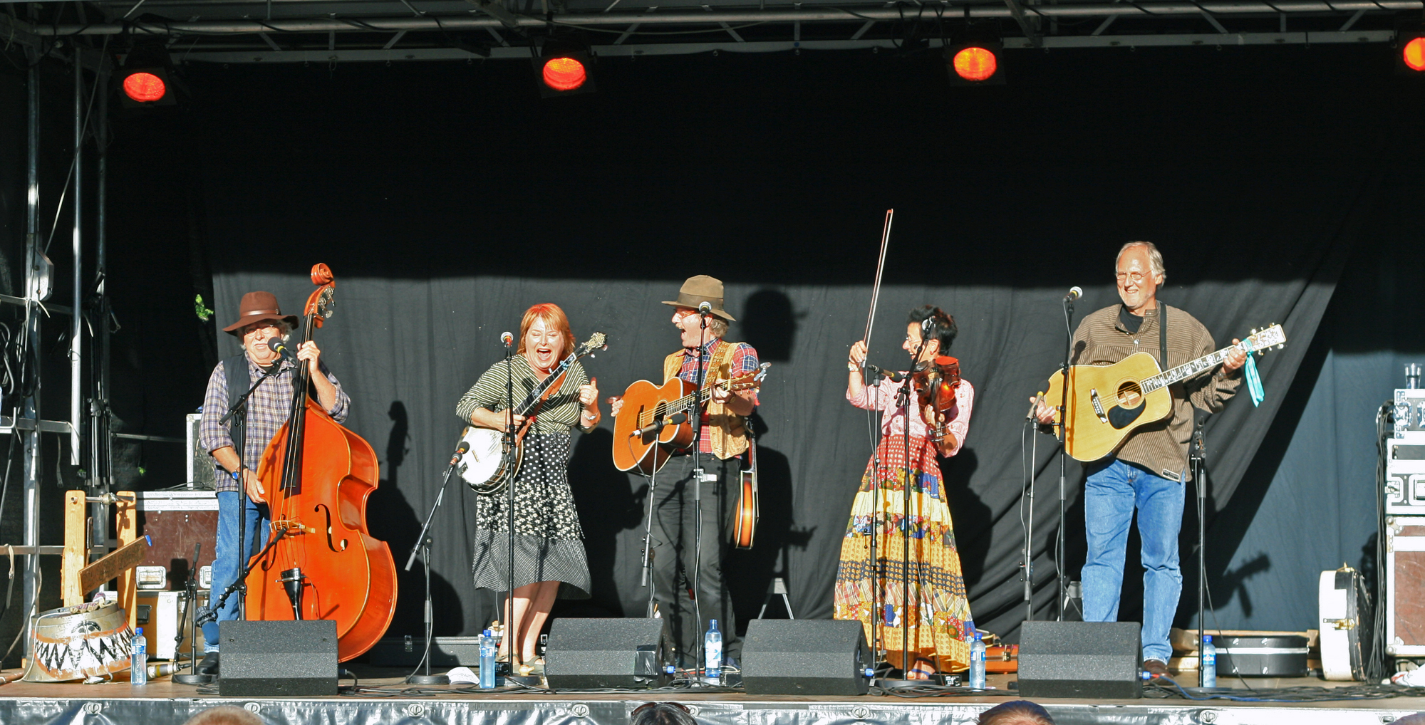 Christiania Fusel & Blaagress opptrer i Ula, Larvik, 18.7.2008